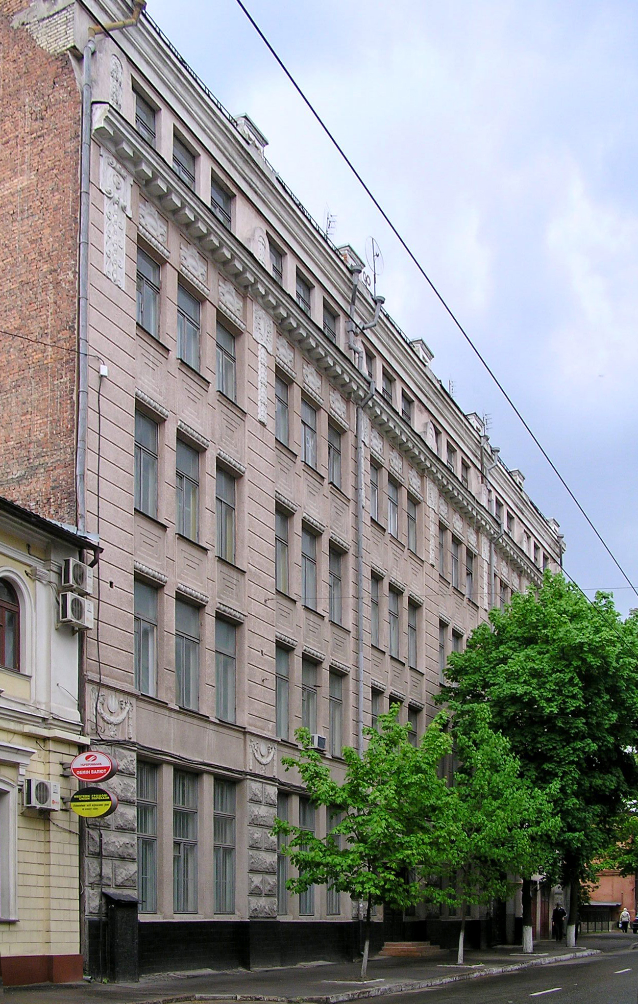 Колишній готель "Паласс" 1914р., вул.Коцарська,9, м.Харків